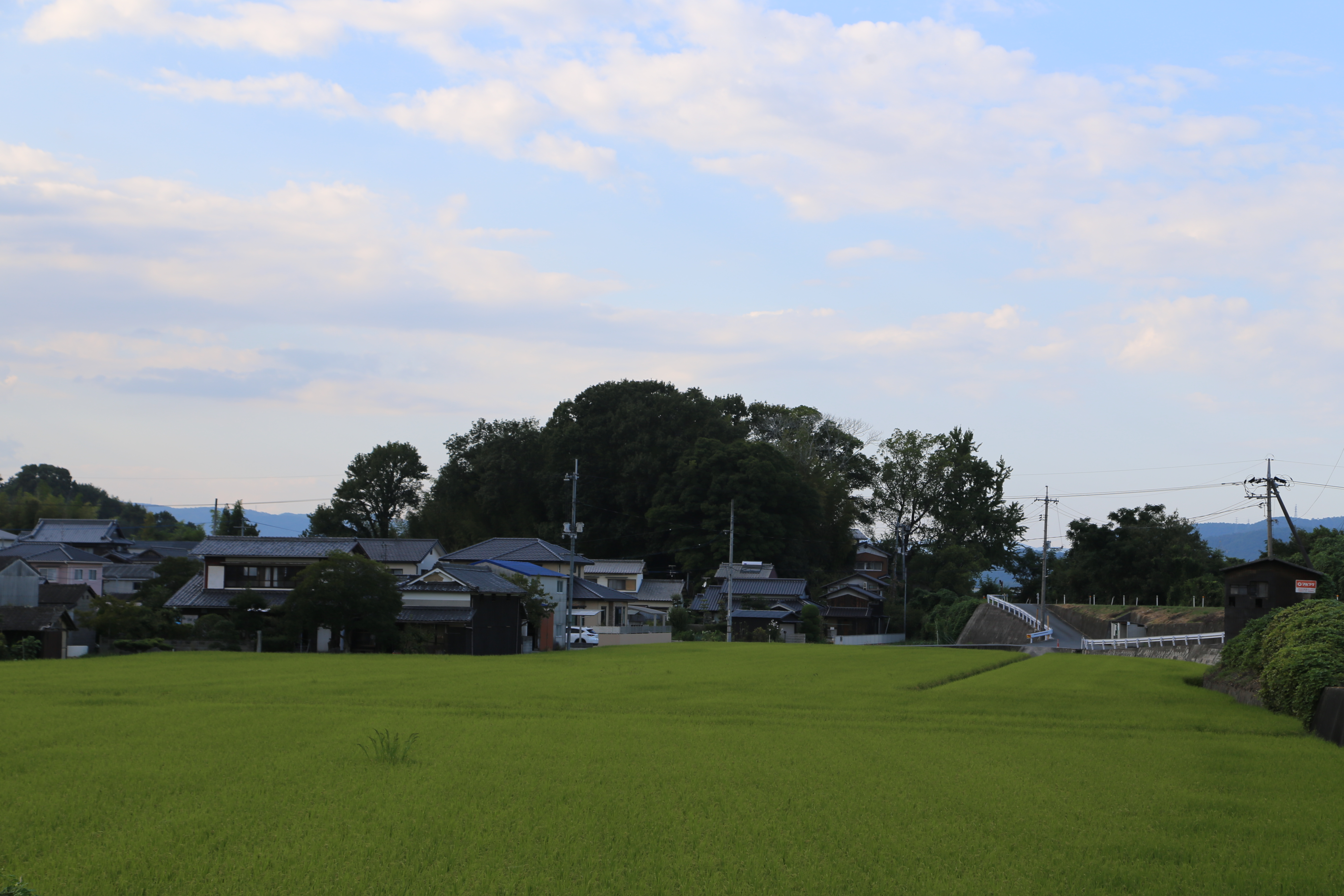 岡山県倉敷市日畑の日幡城跡。